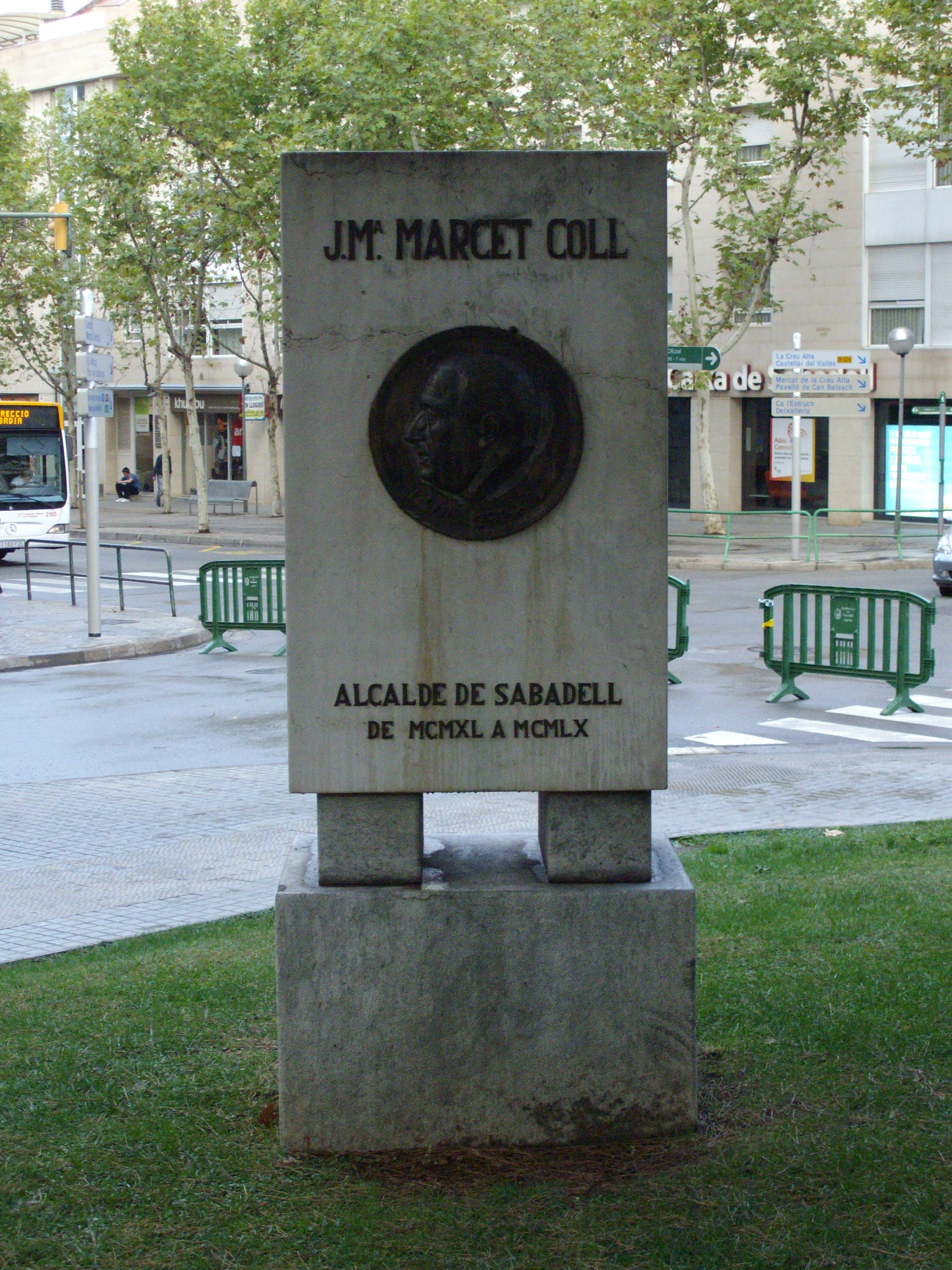 Monumento a Josep Maria Marcet Coll, alcalde de Sabadell de 1940 a 1960, obra del escultor Camil Fàbregas, erigida el 19 de marzo de 1974, el mismo día en que se inauguró la plaza donde está ubicada y que lleva el nombre de dicho alcalde. Está situada en la ciudad de Sabadell, Barcelona (España).